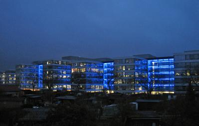 Rückansicht der Neuen Börse in Frankfurt Bockenheim